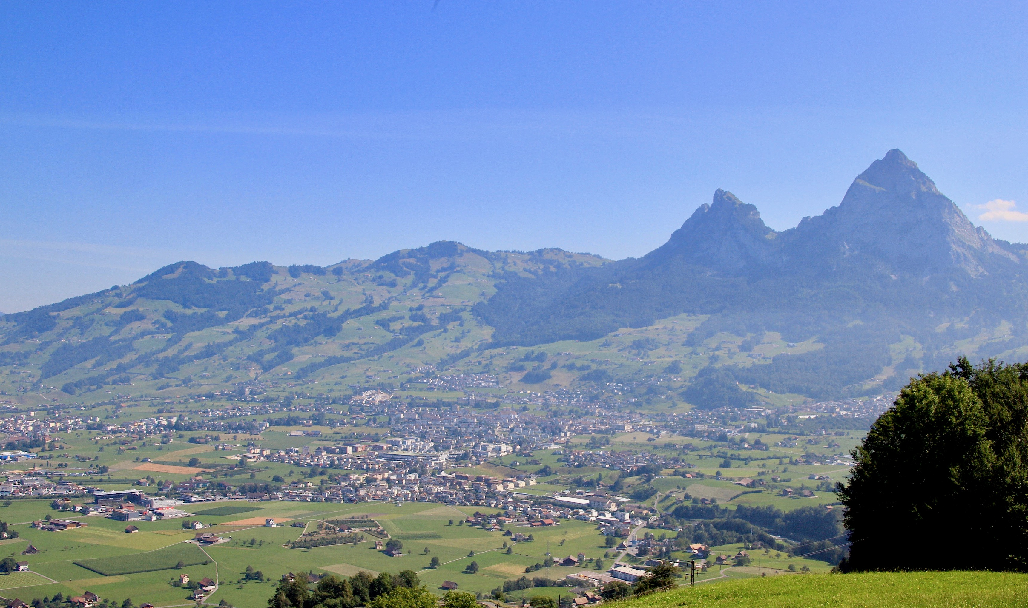 Mythen, vorne Schwyz